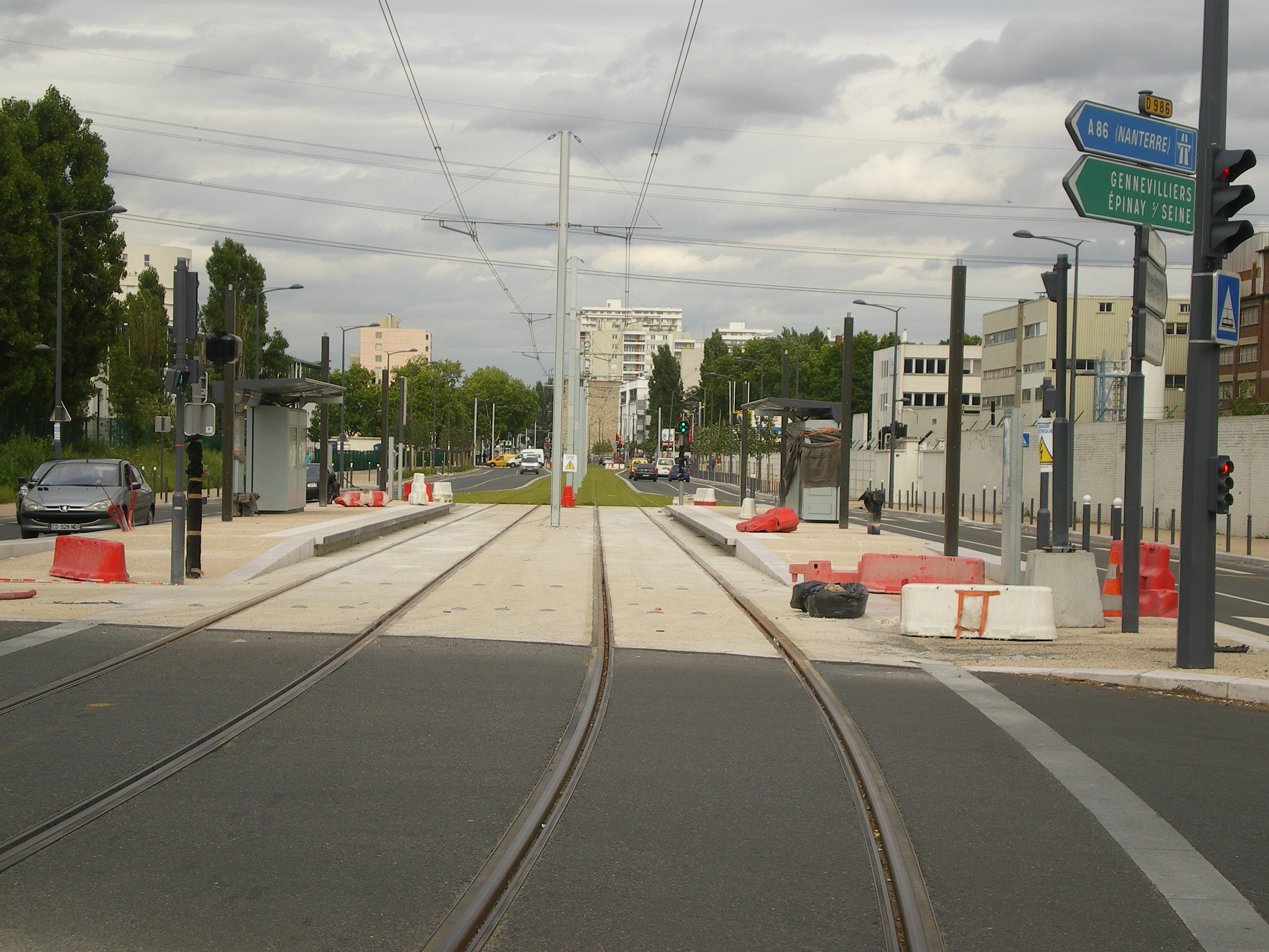 Extension de la ligne T1 à l'Ouest pendant la phase d'essais